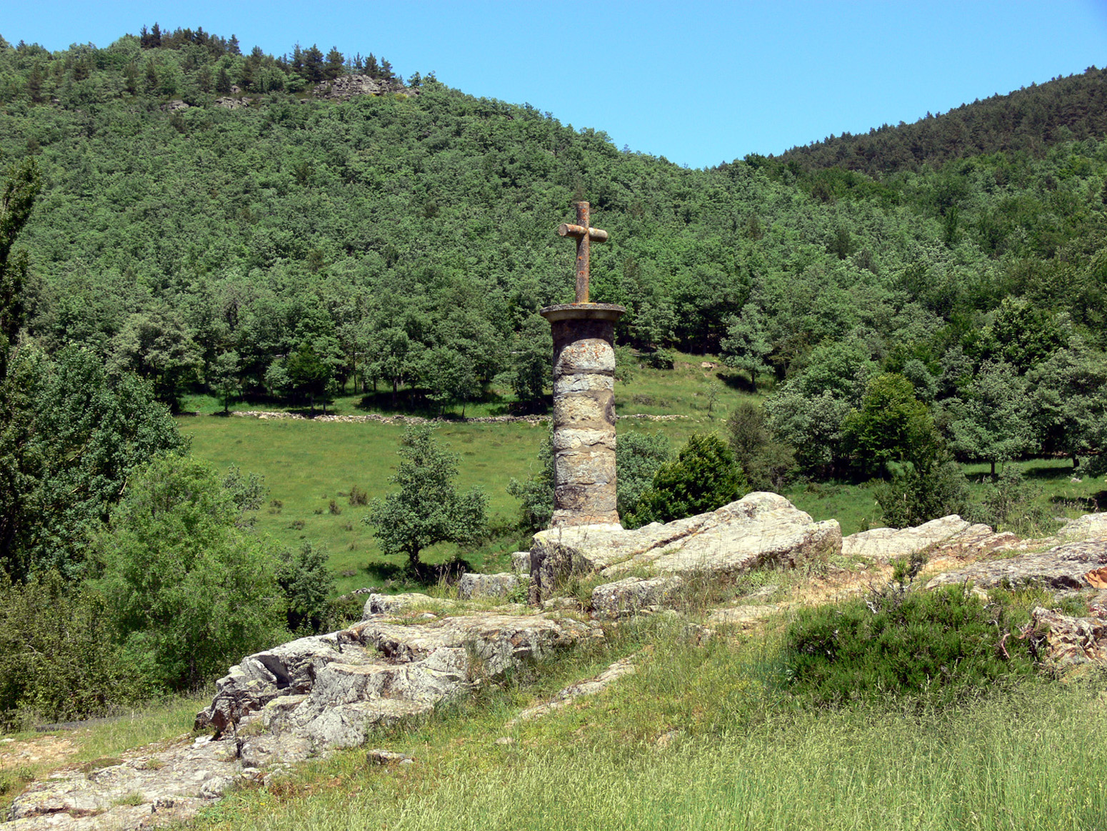 Rollo crucero en la Venta de Piqueras (Lumbreras), La Rioja - España.